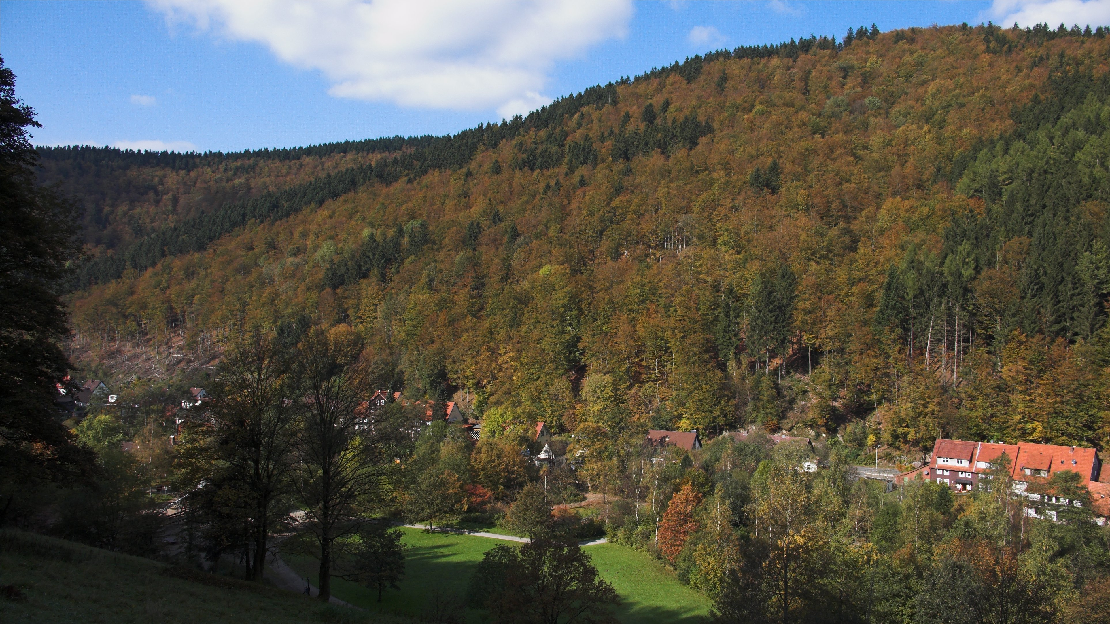 Der Westteil von Sieber, aufgenommen vom Panoramaweg